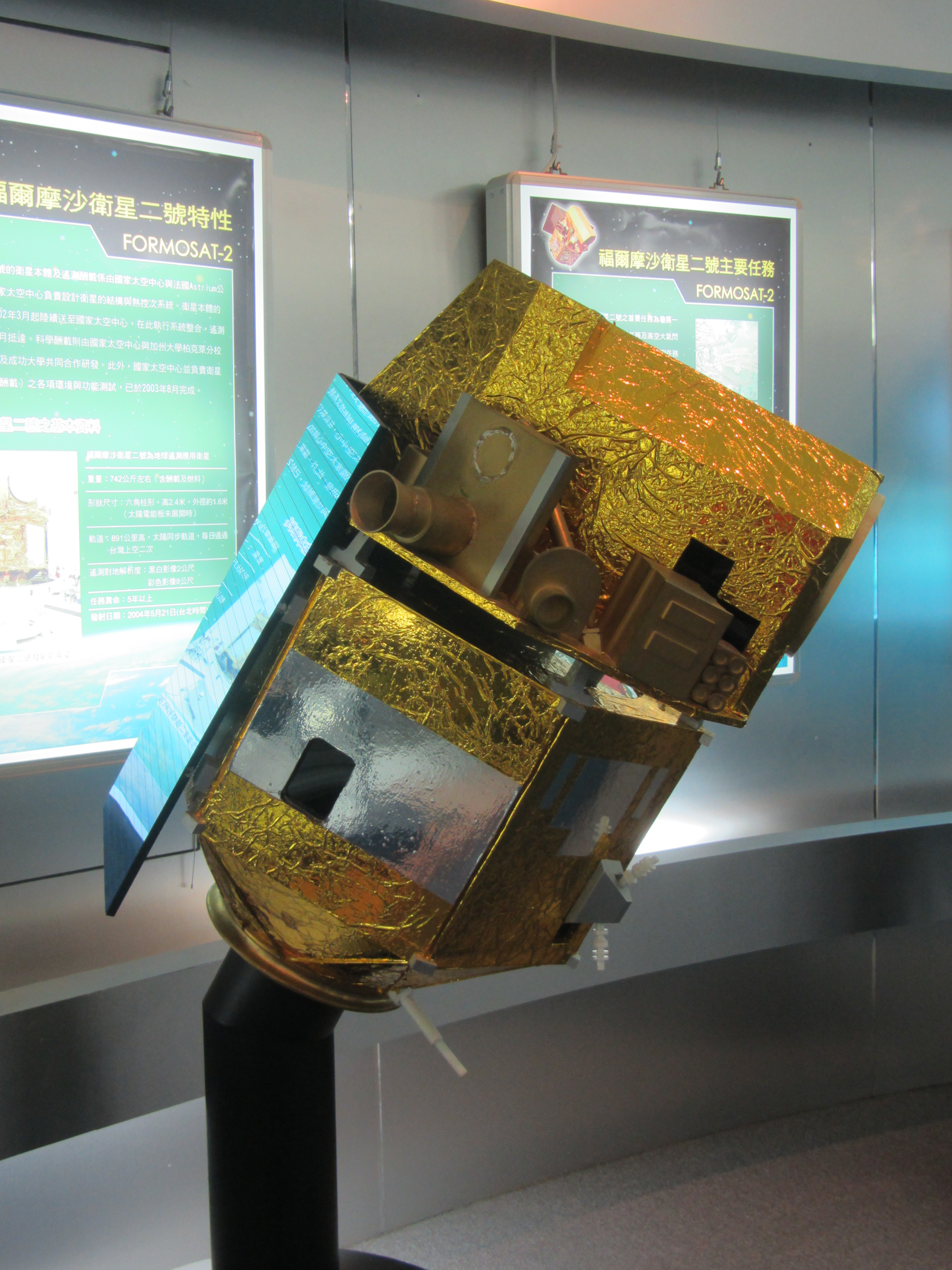 福爾摩沙衛星二號模型